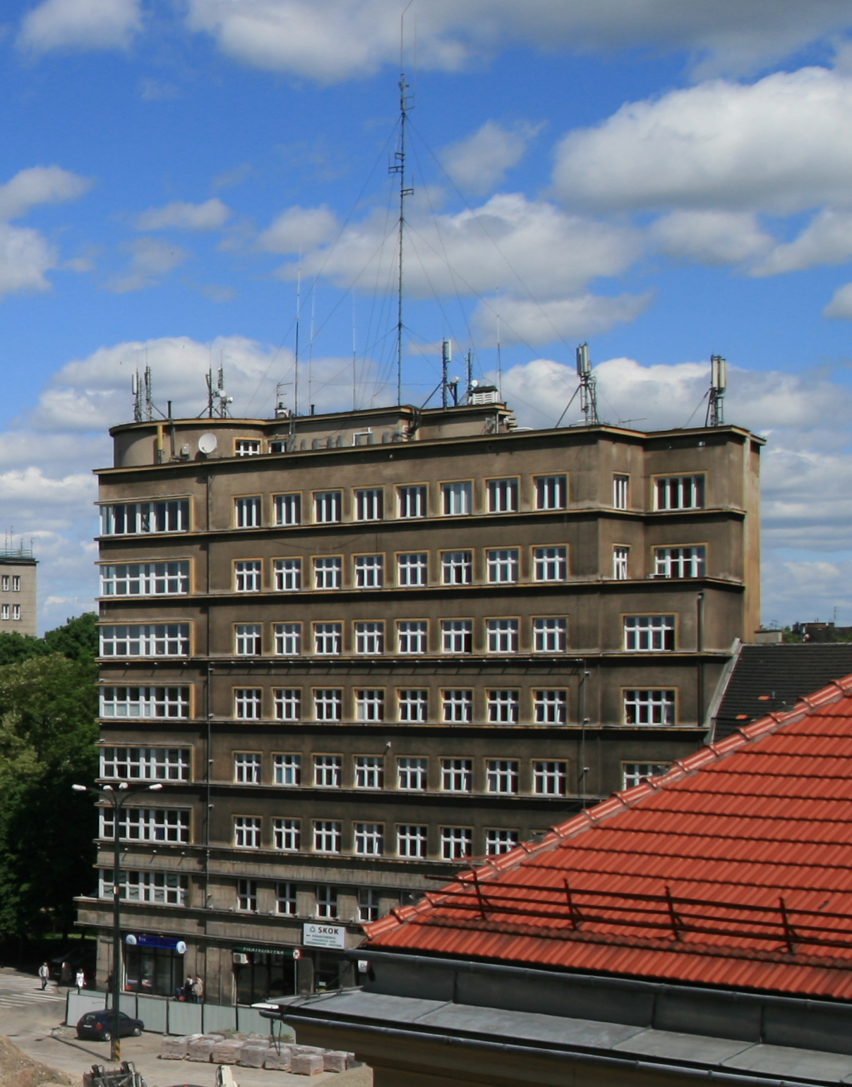 Budynek Komunalnej Kasy Oszczędnościowej w Krakowie